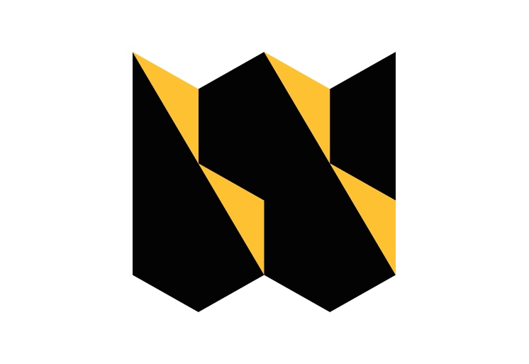 Vörumerki Brandenburg auglýsingastofu.